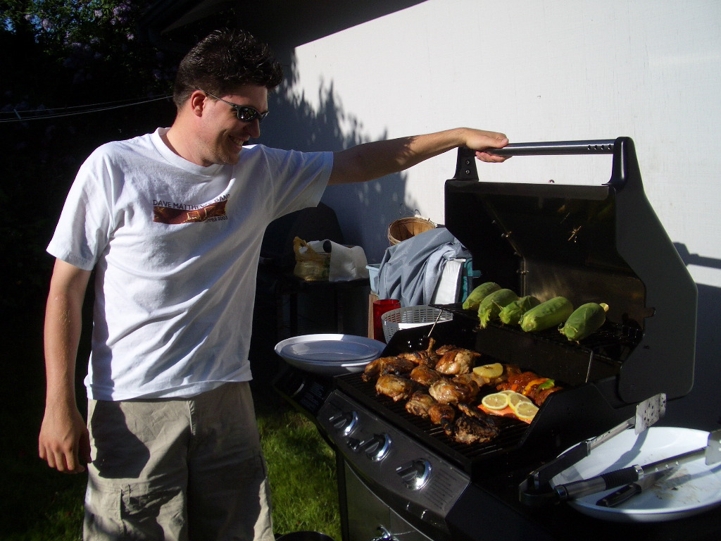 Zach Snyder and His Grill